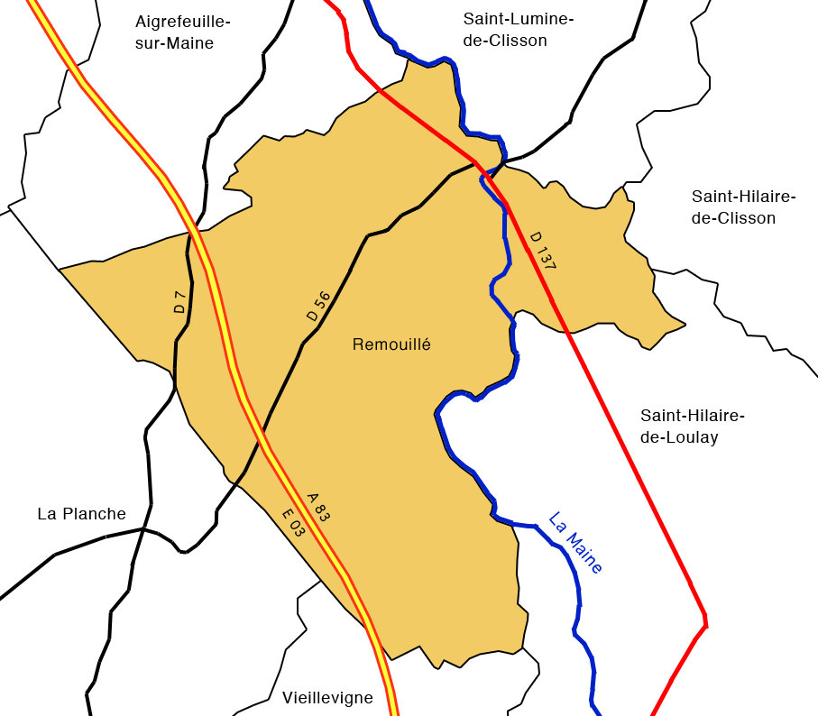 Reseau routier de Remouillé, Loire-Atlantique, France